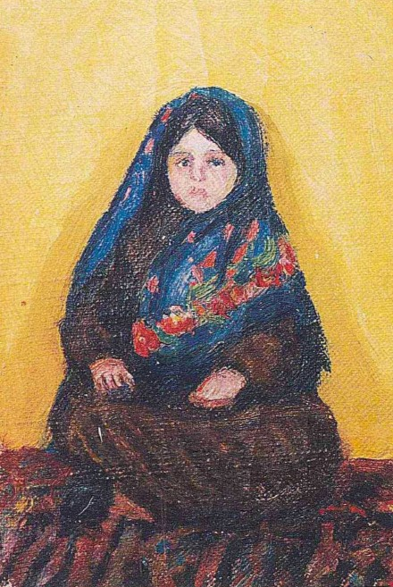 Qız portreti